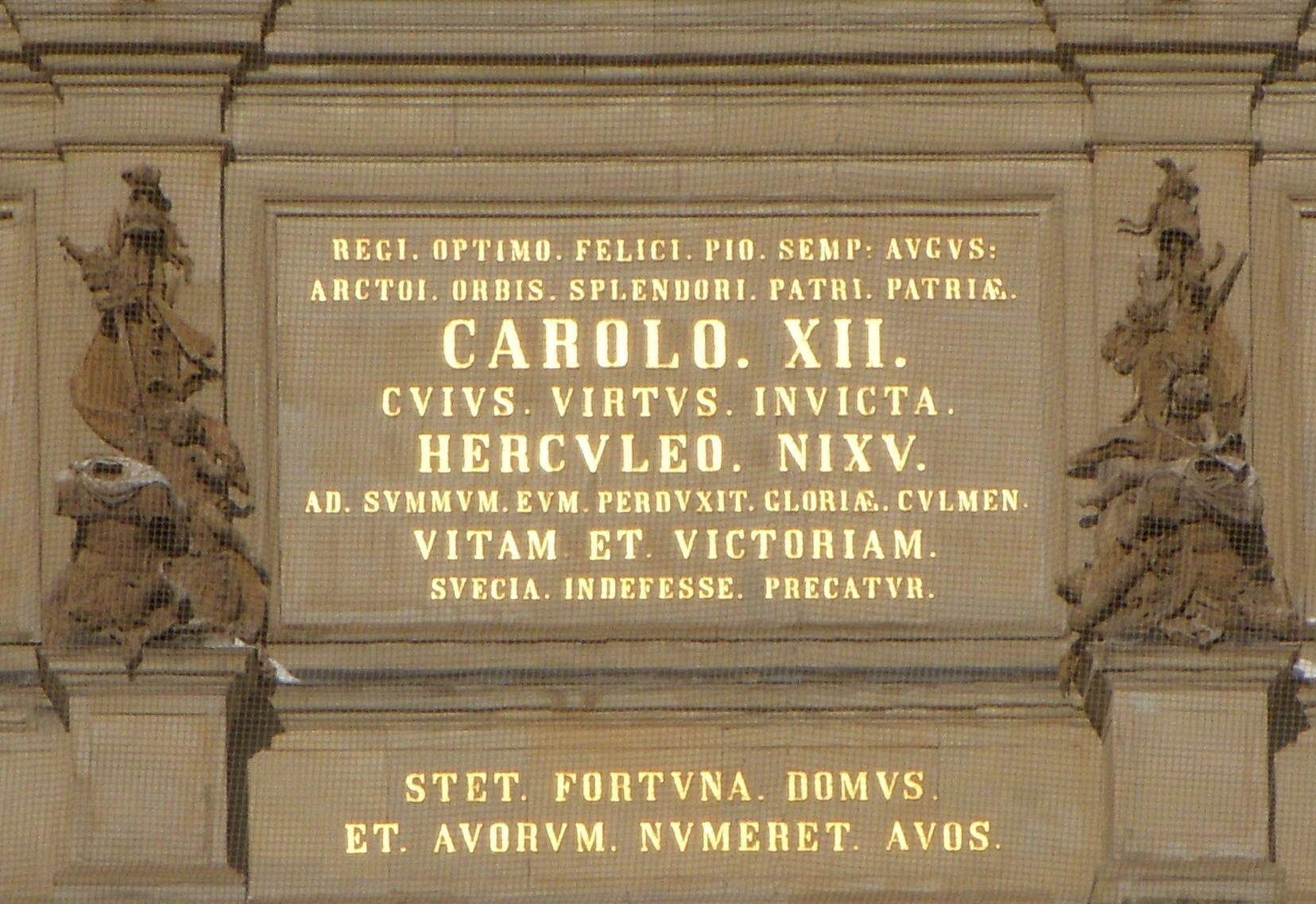 Sentens på latin i triumfbågen (södra fasad), Stockholms slott: "REGI OPTIMO FELICI PIO SEMPER AVGVSTO ARCTOI ORBIS SPLENDORI PATRI PATRIAE CAROLO XII CVIVS VIRTVS INVICTA HERCVLEO NIXV AD SVMMVM EVM PERDVXIT GLORIAE CVLMEN VITAM ET VICTORIAM SVECIA INDEFESSE PRECATVR STET FORTVNA DOMVS ET AVORVM NUMERET AVOS" På svenska: Åt den bäste, lycklige, fromme och alltid upphöjde kungen / det norra halvklotets lysande fosterlandsfader / Karl XII / vars obesegrade dygd / genom herkulisk strävan / har lett honom till ärans höjd / liv och seger / och Sveriges outtröttliga önskan / stå här lyckosamma byggnad / och lys av guld